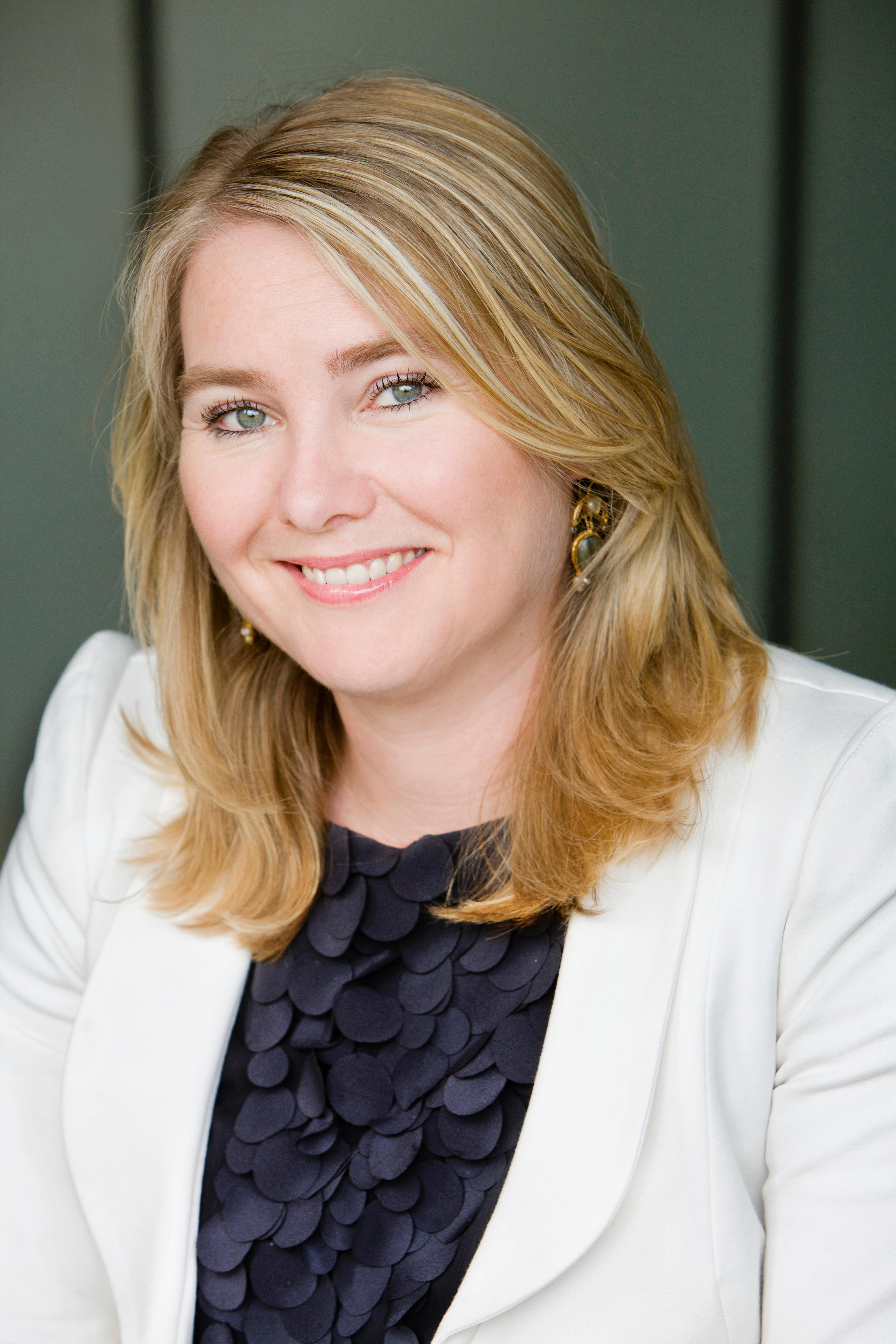 Minister van Infrastructuur en Milieu Melanie Schultz van Haegen